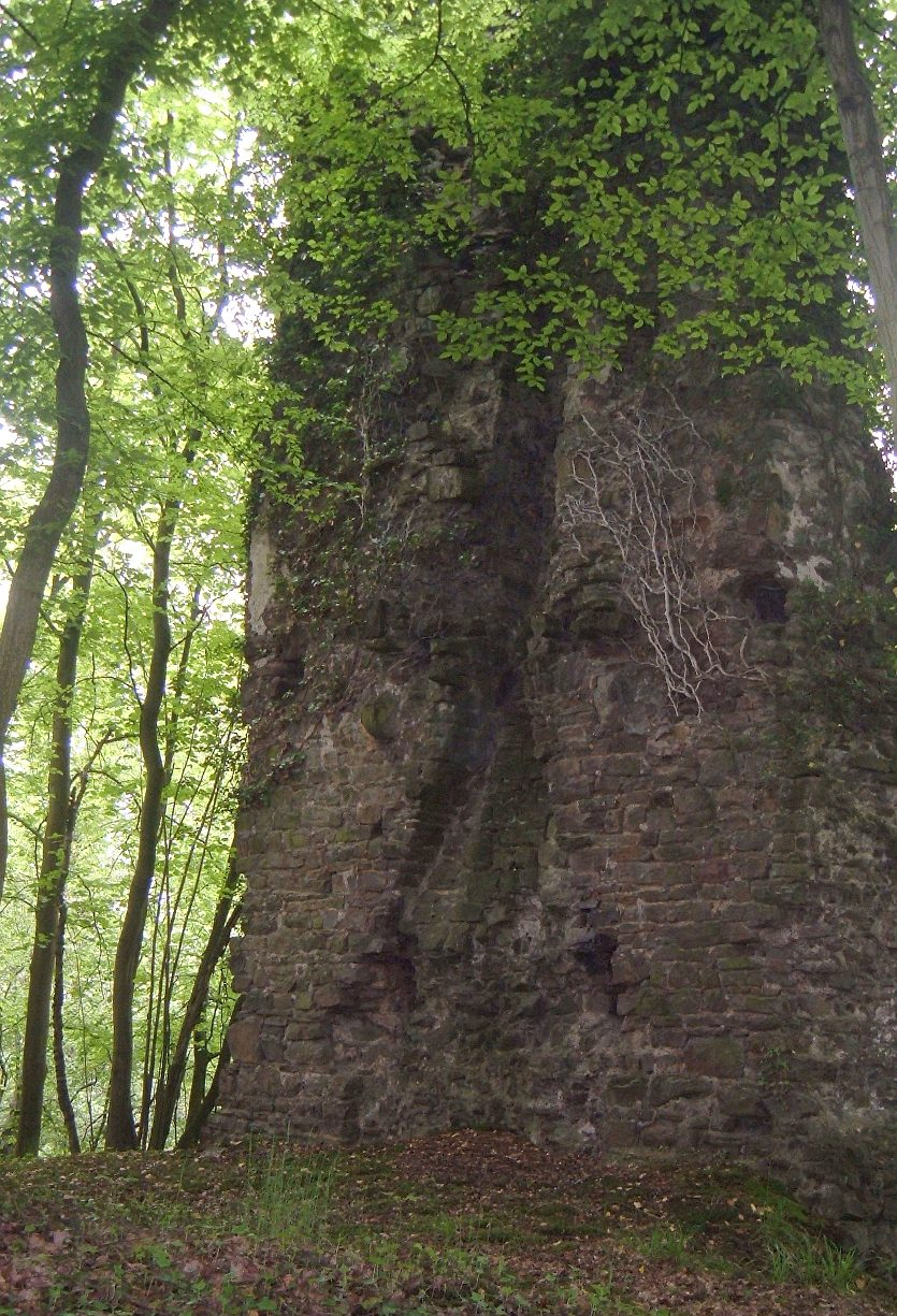 Burgruine Großbernsau in Overath. 50° 56,583; 7° 18,083